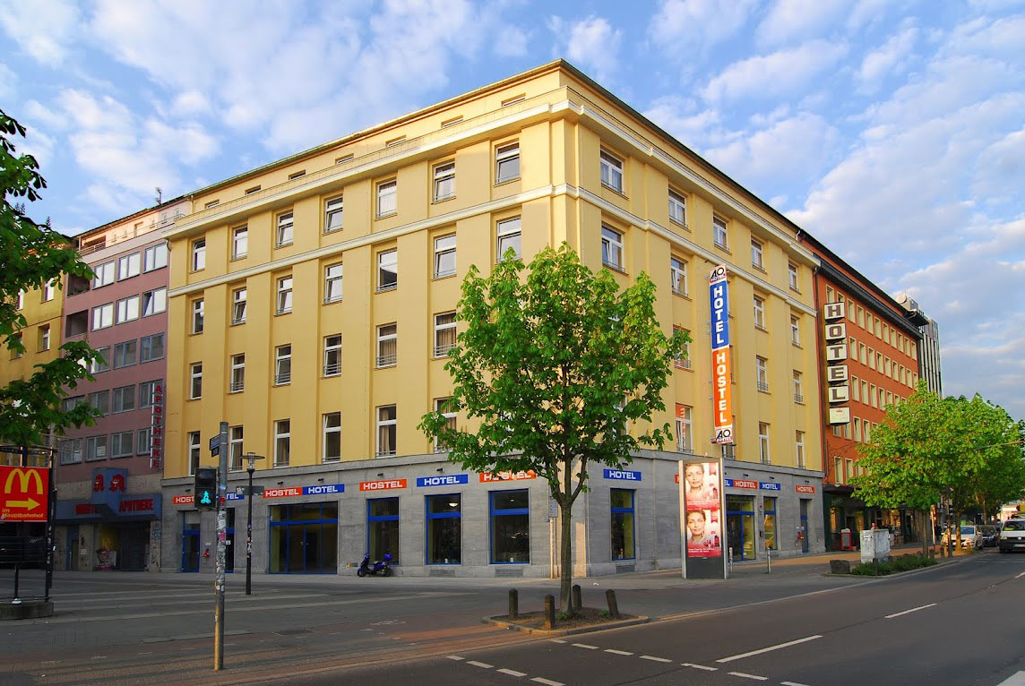 Typische A&O Fassage in Gelb © A&O HOTELS and HOSTELS Holding AG